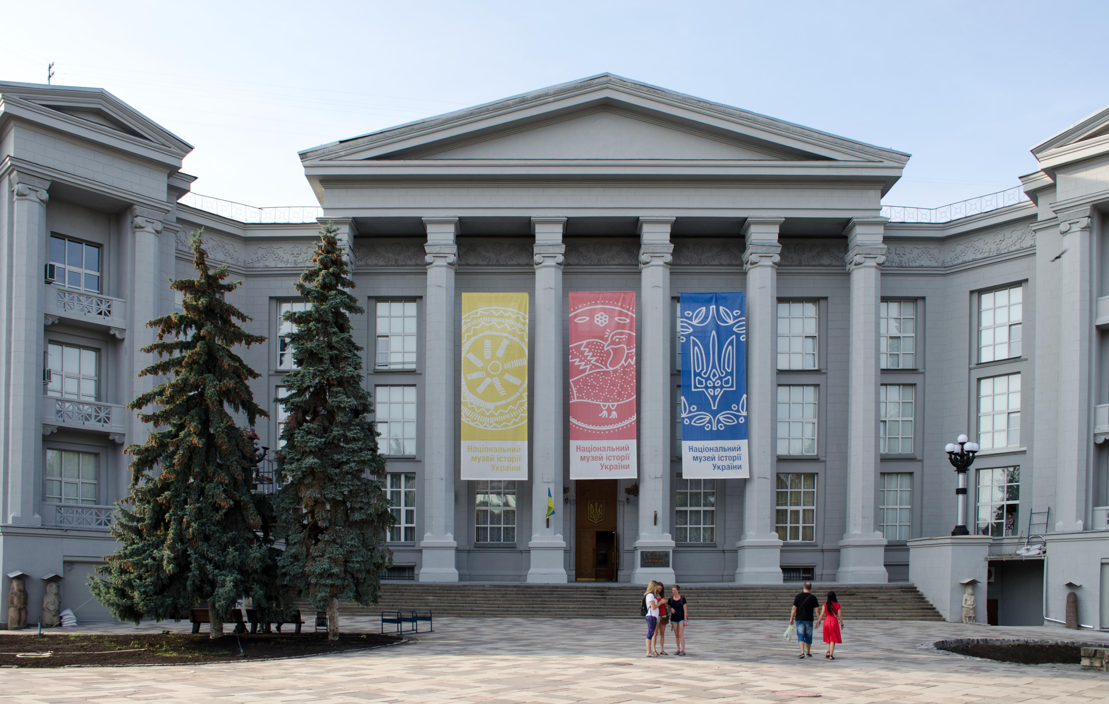 Будинок Київської художньої школи ім. Т. Шевченка, де з 1944 р. розміщується Державний історичний музей України, з діяльністю якого і формуванням колекцій пов'язані імена Ф. Ернста, П. Потоцького, В. Хвойки, М. Біляшівського, Д. Щербаківського та ін., Київ, Володимирська вул., 2